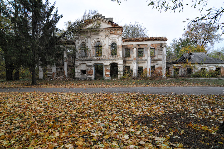 руїни палацу Браницьких у Рудому Селі